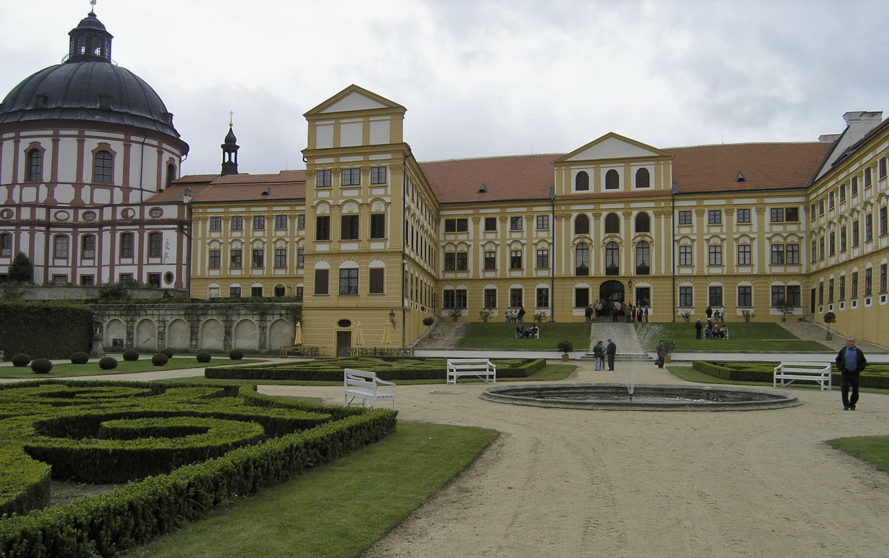 Zámek Jaroměřice nad Rokytnou, zadní trakt (vlevo) s propojením na kostel sv. Markéty.